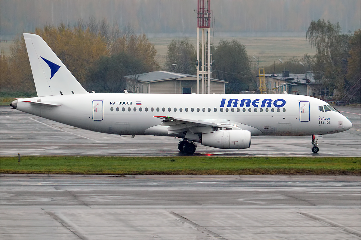 IrAero, RA-89008, Sukhoi Superjet 100-95B